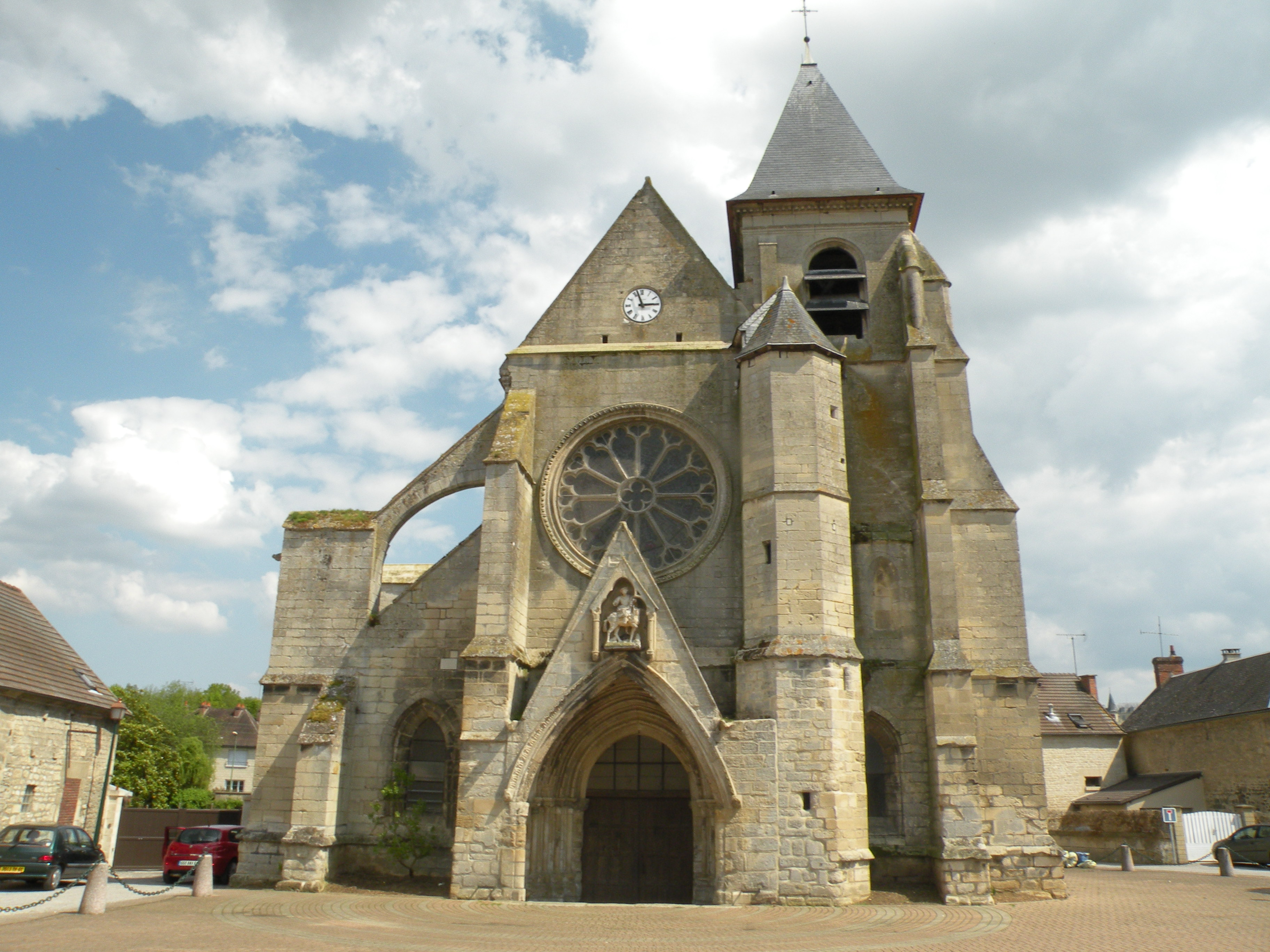 Église de Cires-lès-Mello, Oise, France